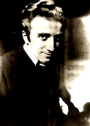 Photographie de l'écrivain Pitigrilli (pseud. de Dino Segre, 1893 - 1975). Photo d'avant-guerre, prob. décennie 1930.